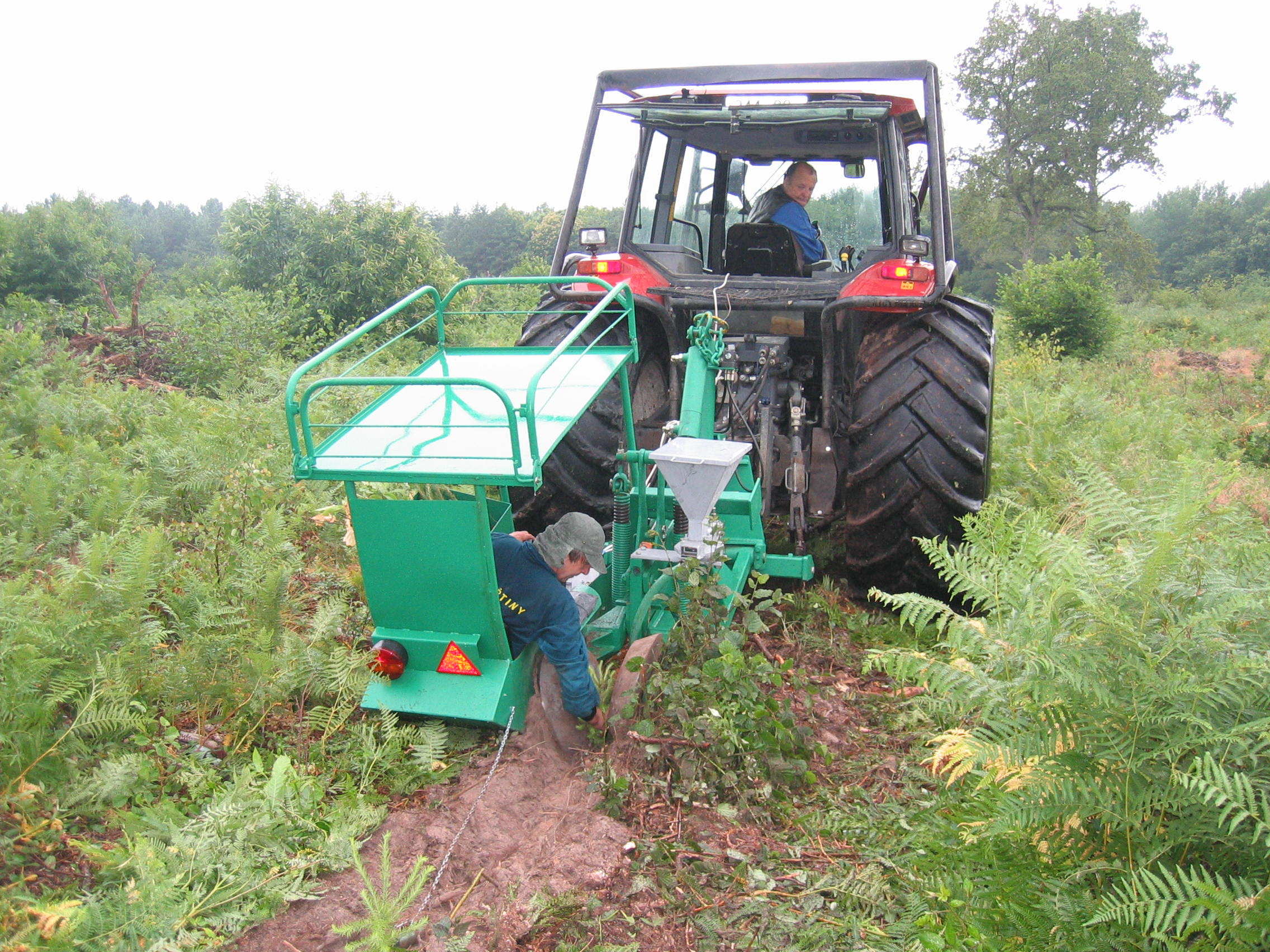 Une planteuse est un machine forestière destinée aux plantations mécaniques (type Larix RZS-1)